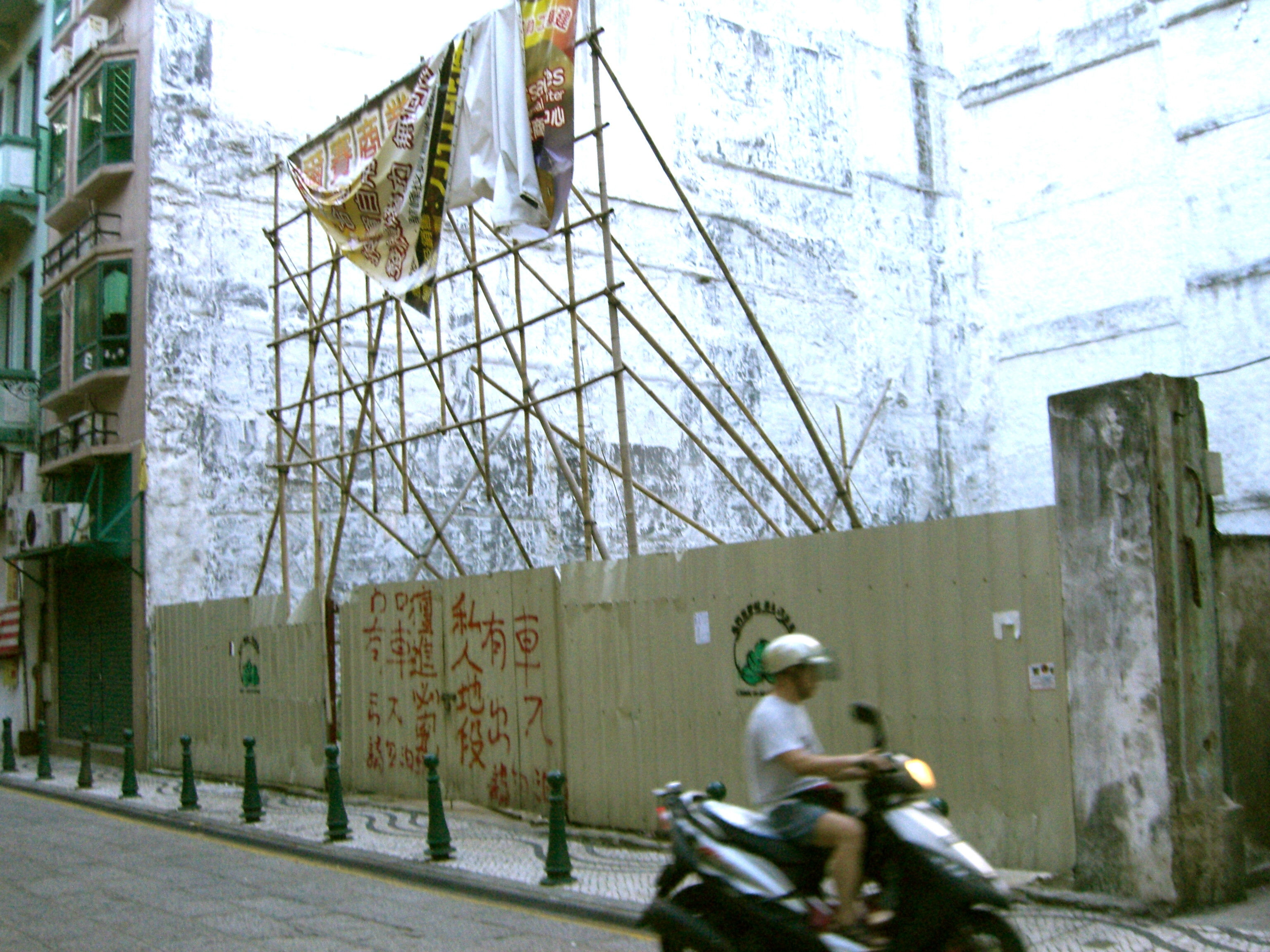 Rua de Cinco de Outubro